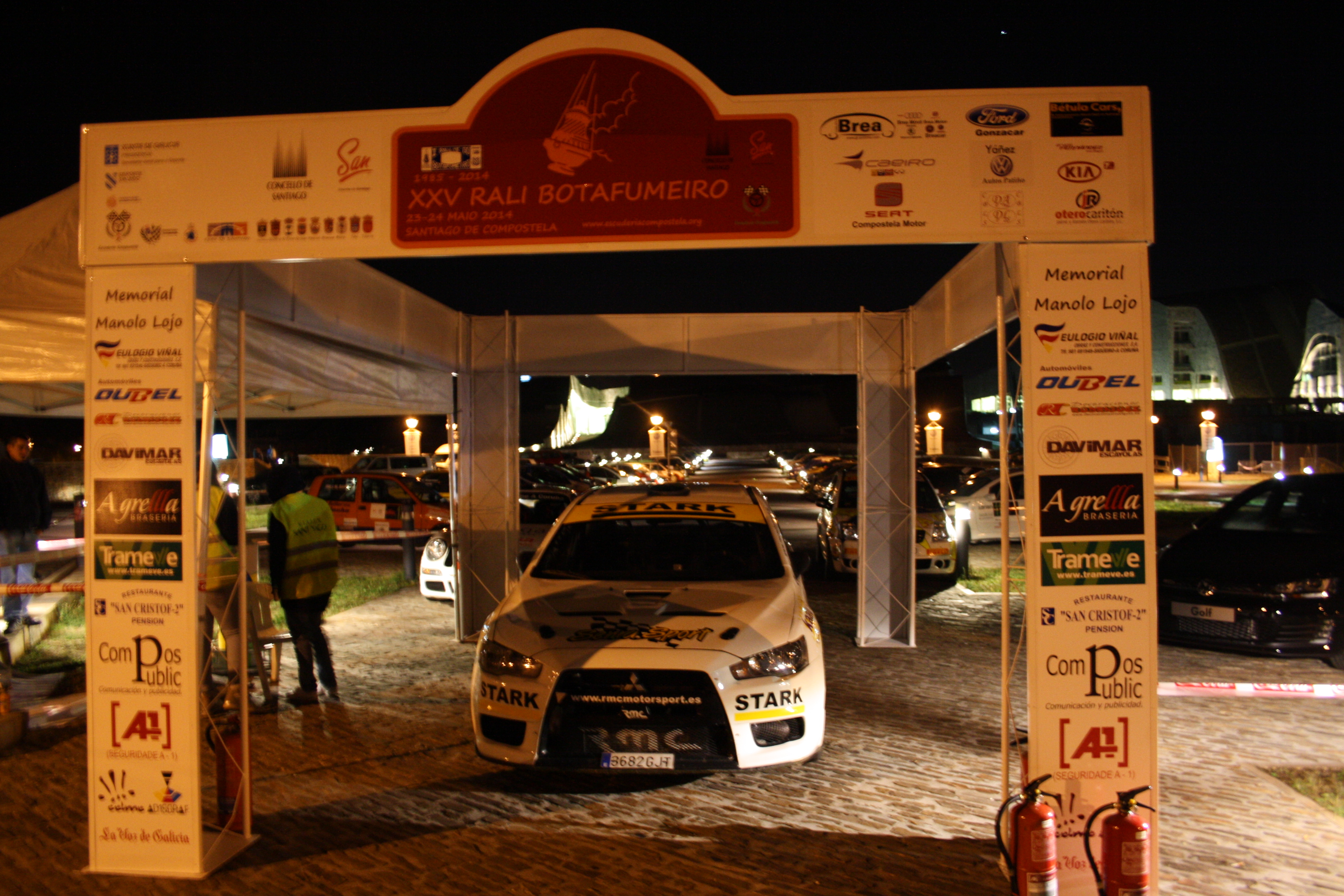 Rally Botafumeiro 2014. Parque cerrado ubicado en la Ciudad de la Cultura (GAIAS). Santiago de Compostela.